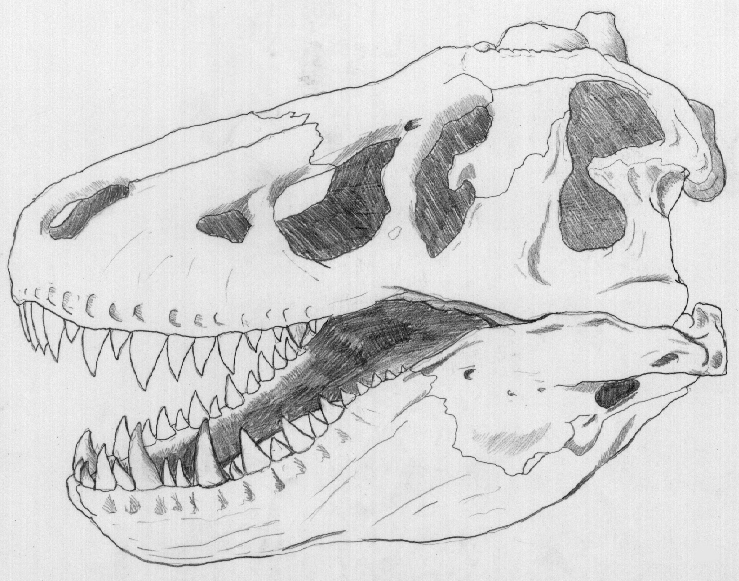 Tyrannosaurus koponyája